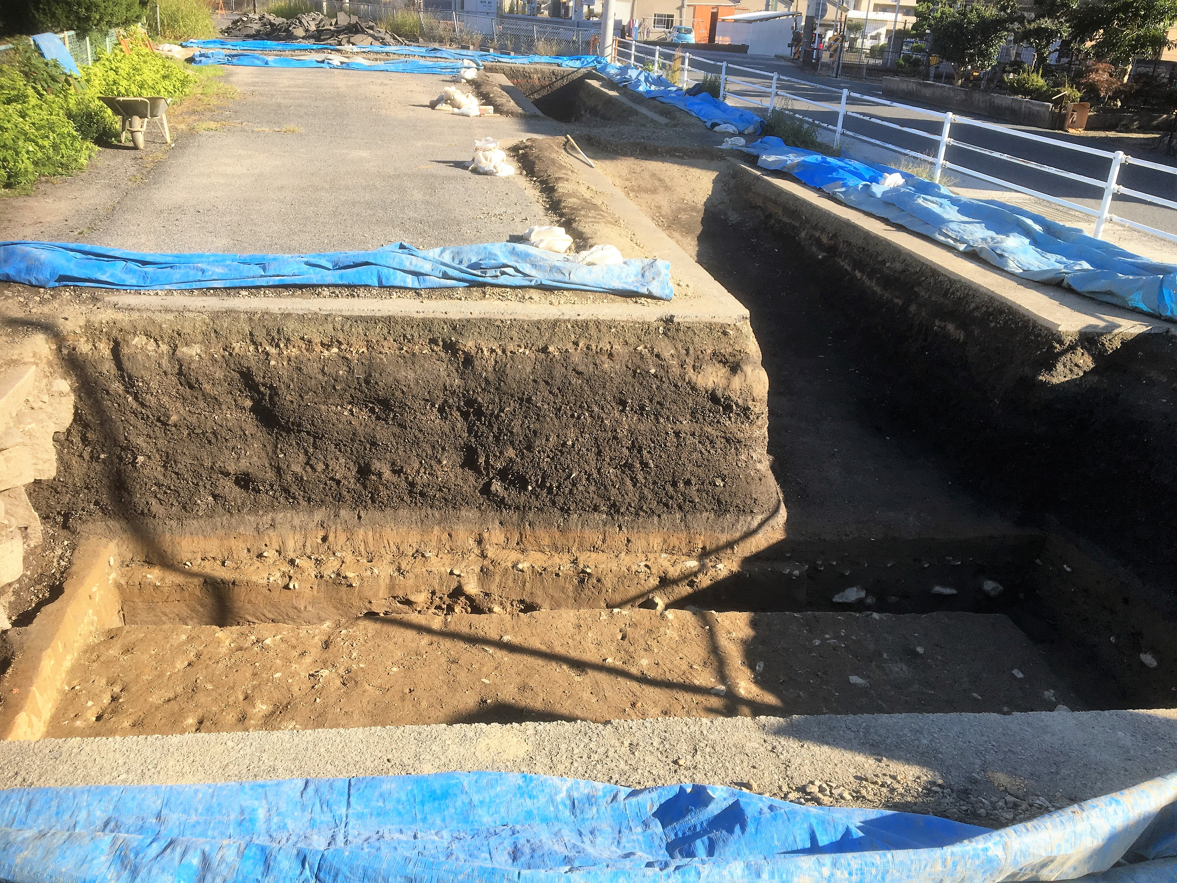 広島県府中市府中町での旧山陽道の発掘作業。旧平松医院跡地。 34°34'17.9"N 133°14'04.4"E 34.571636, 133.234550